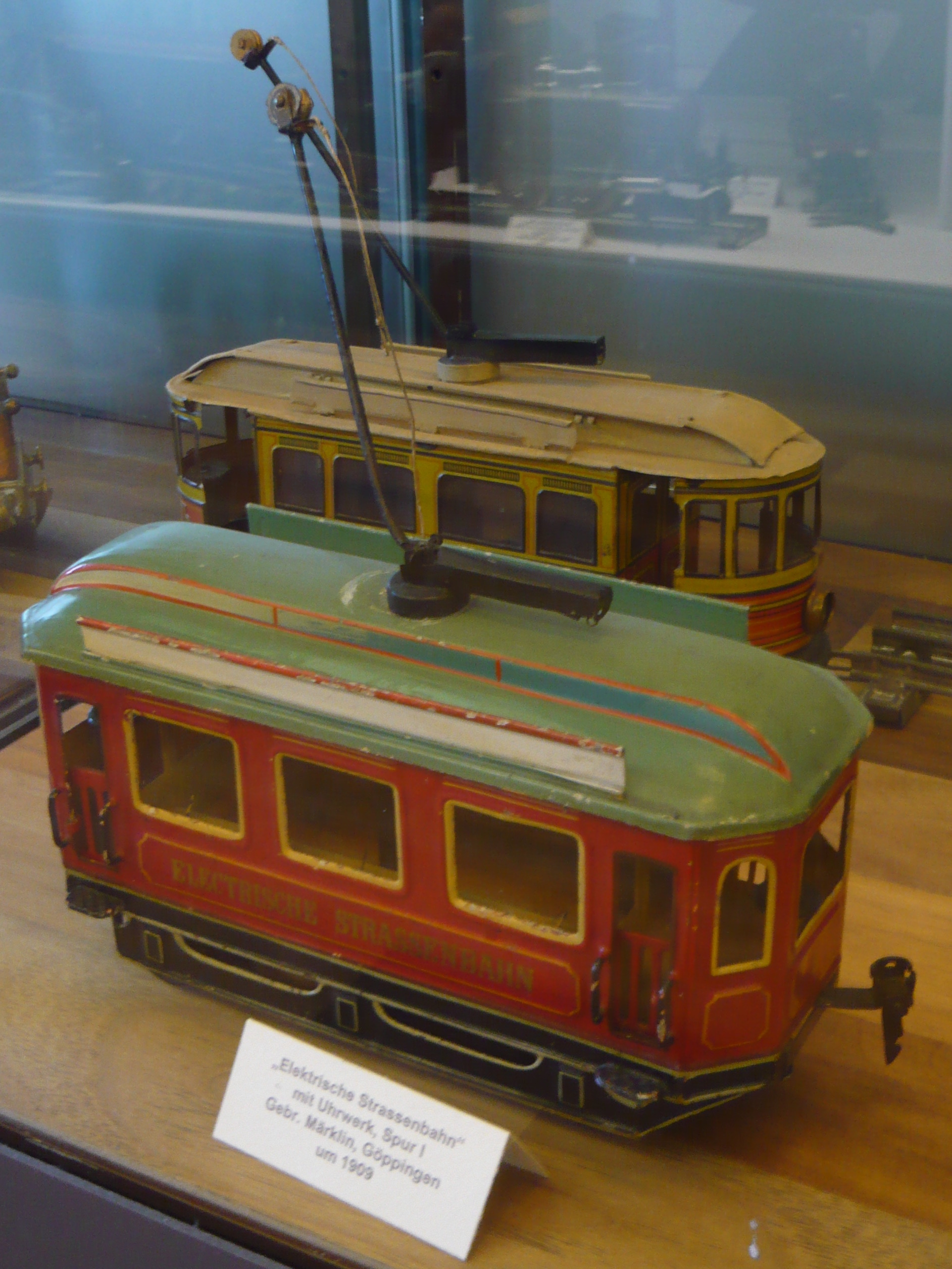 Elektrische Straßenbahn mit Uhrwerk, Spur I, Märklin, um 1909, aufgenommen im Zürcher Spielzeugmuseum Native nameZürcher SpielzeugmuseumLocationZürich, SwitzerlandCoordinates47° 22′ 23.16″ N, 8° 32′ 23.21″ E Established1956Web pageZürcher SpielzeugmuseumAuthority control : Q248517 institution QS:P195,Q248517